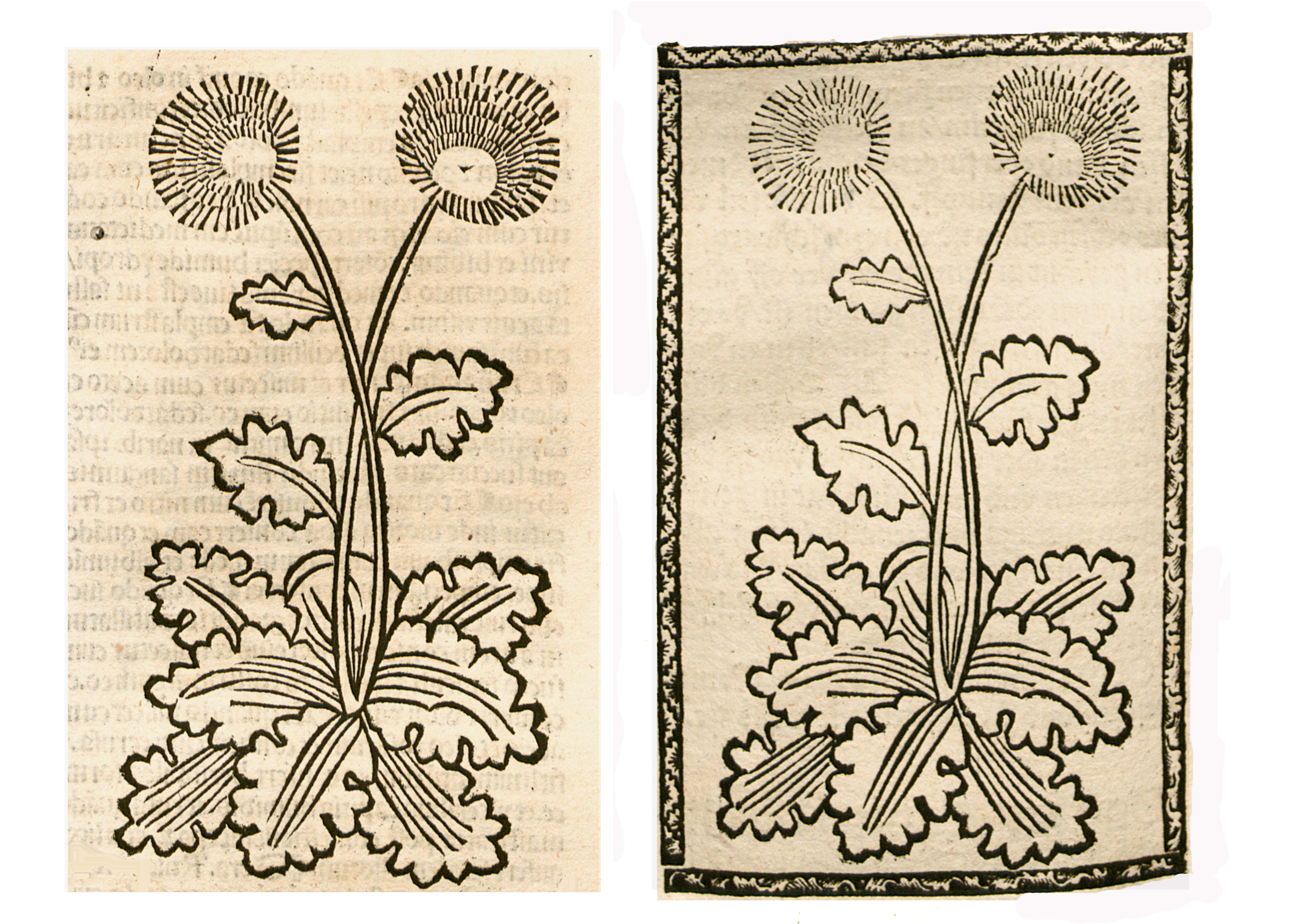 Abbildung von: Pfaffen Krut Rörlin (Taraxacum officinale)